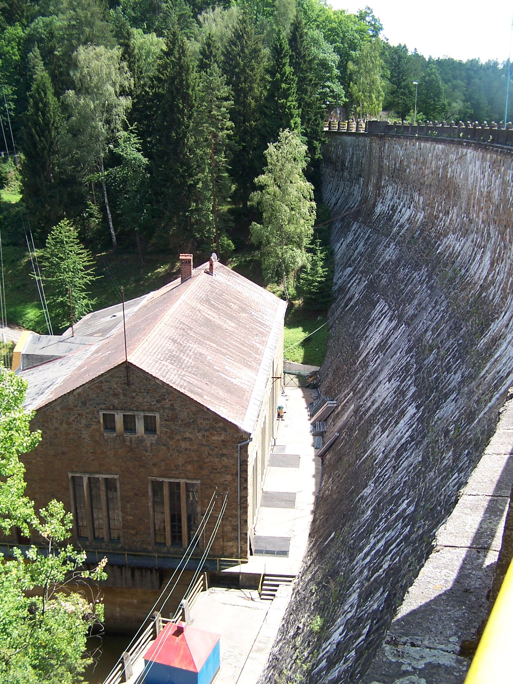 Zapora retencyjna na Jeziorze Złotnickim